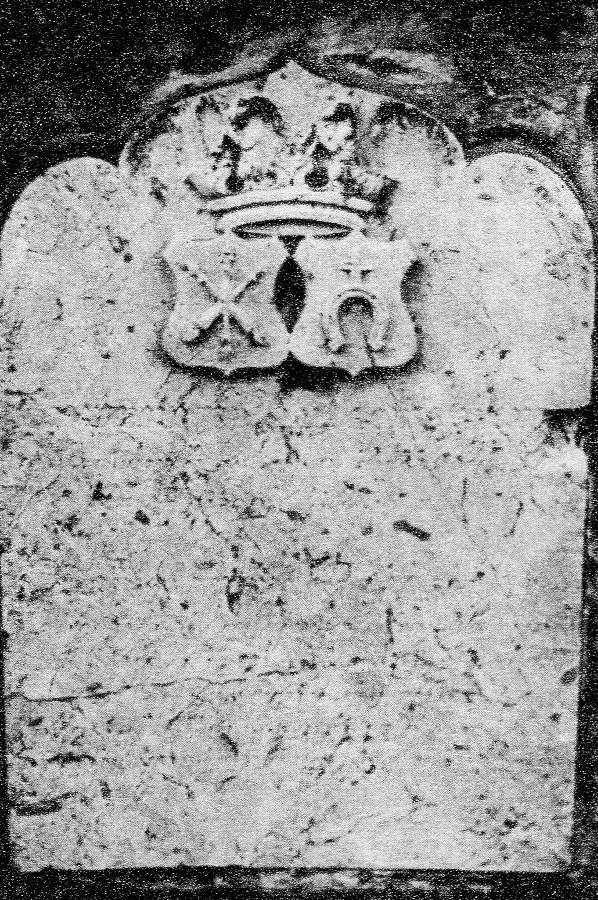 Aleksander Saryusz-Romiszewski - epitafium w Bolesławiu. 1830r.